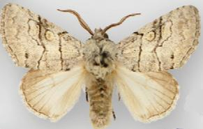 Charadra dispulsa male